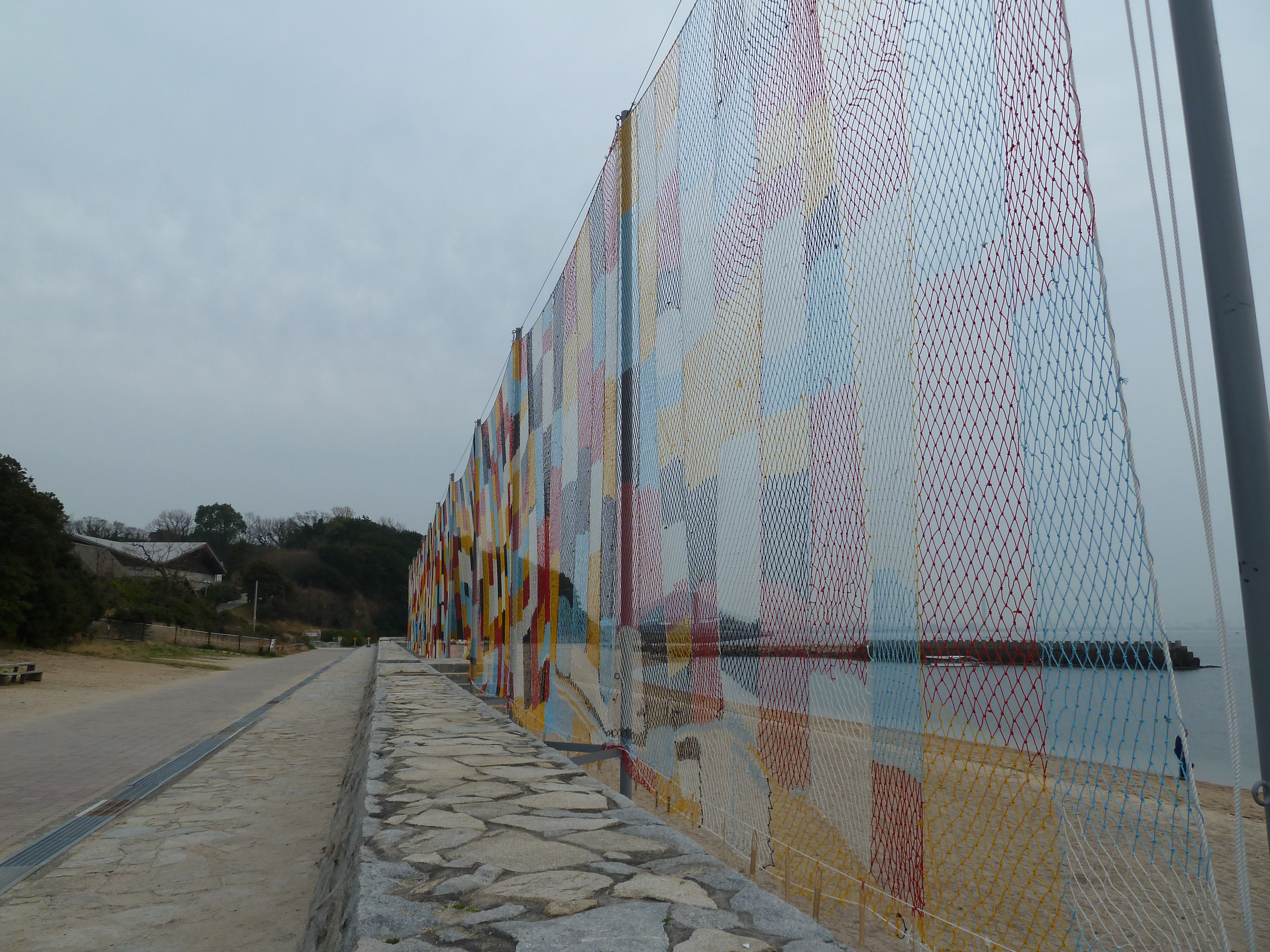 syami shima net art 2013